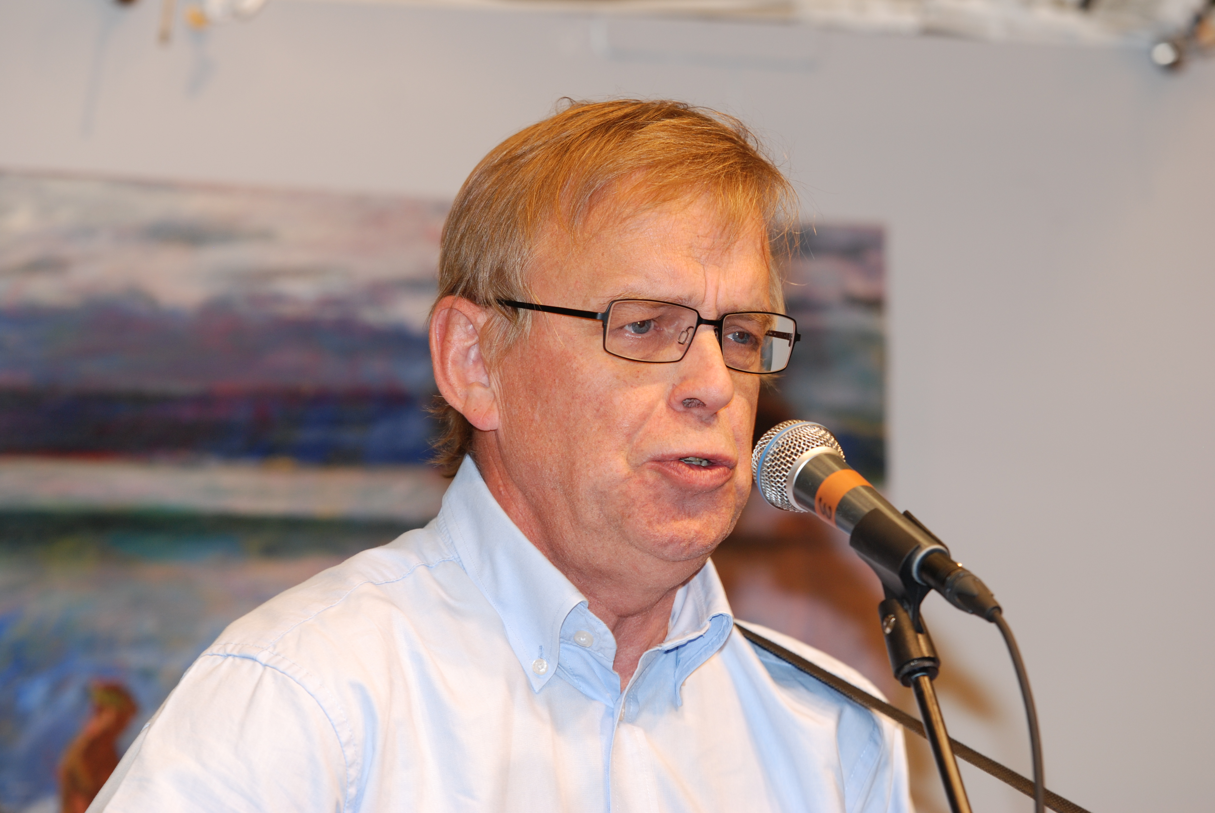 Värmlandstrubaduren och f.d. länsrådet Björn Sandborg i Värmlandsmontern på Bokmässan i Göteborg 2013.